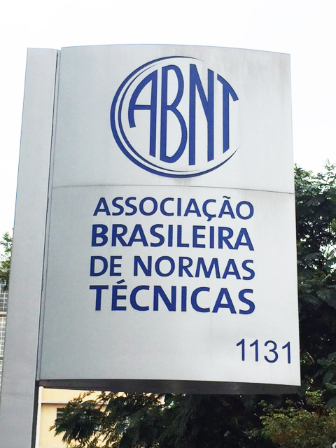 Escritório da ABNT em São Paulo.